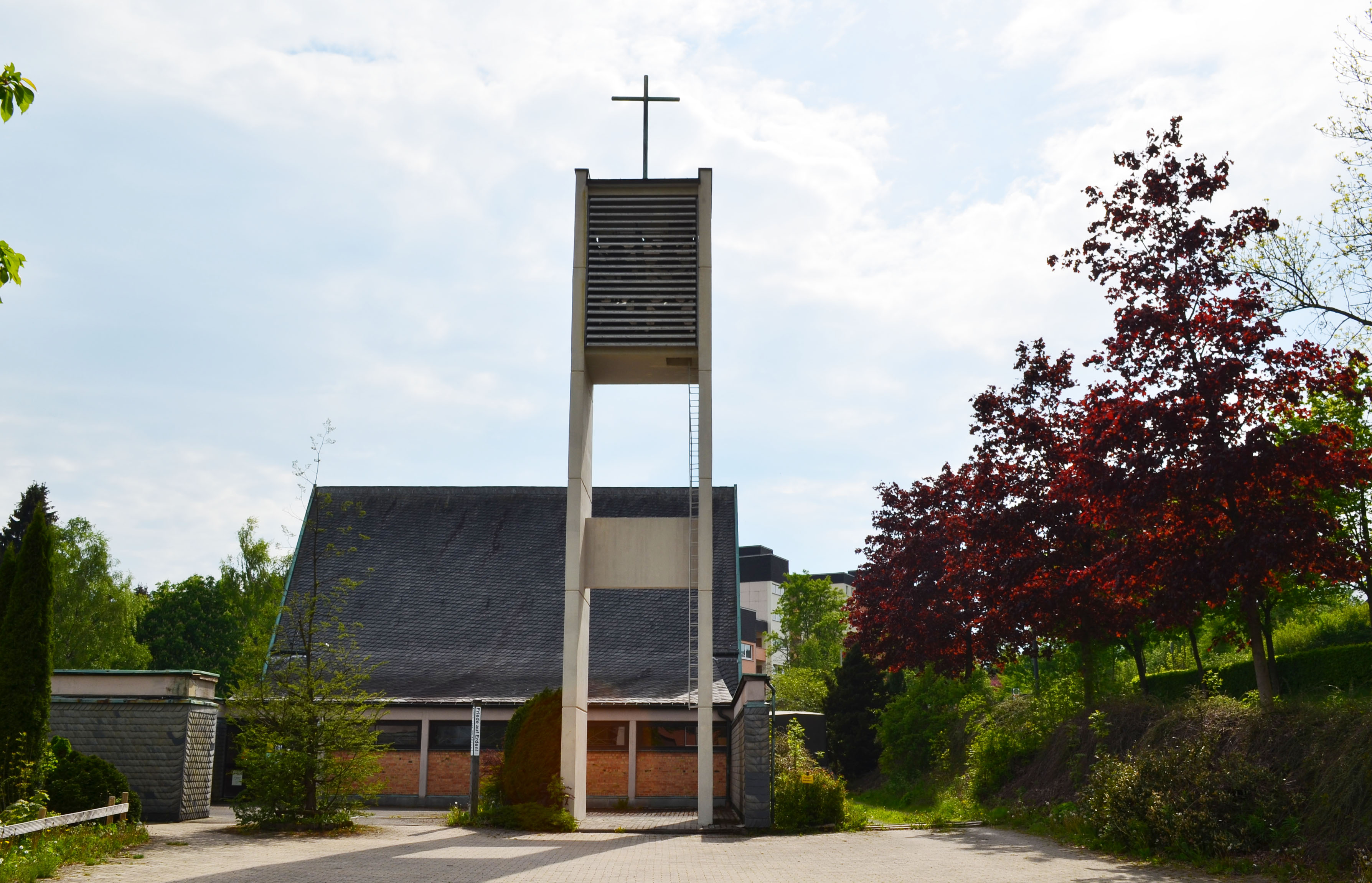 Gudenhagen - Petersborn evangelische Kirche Vorderansicht